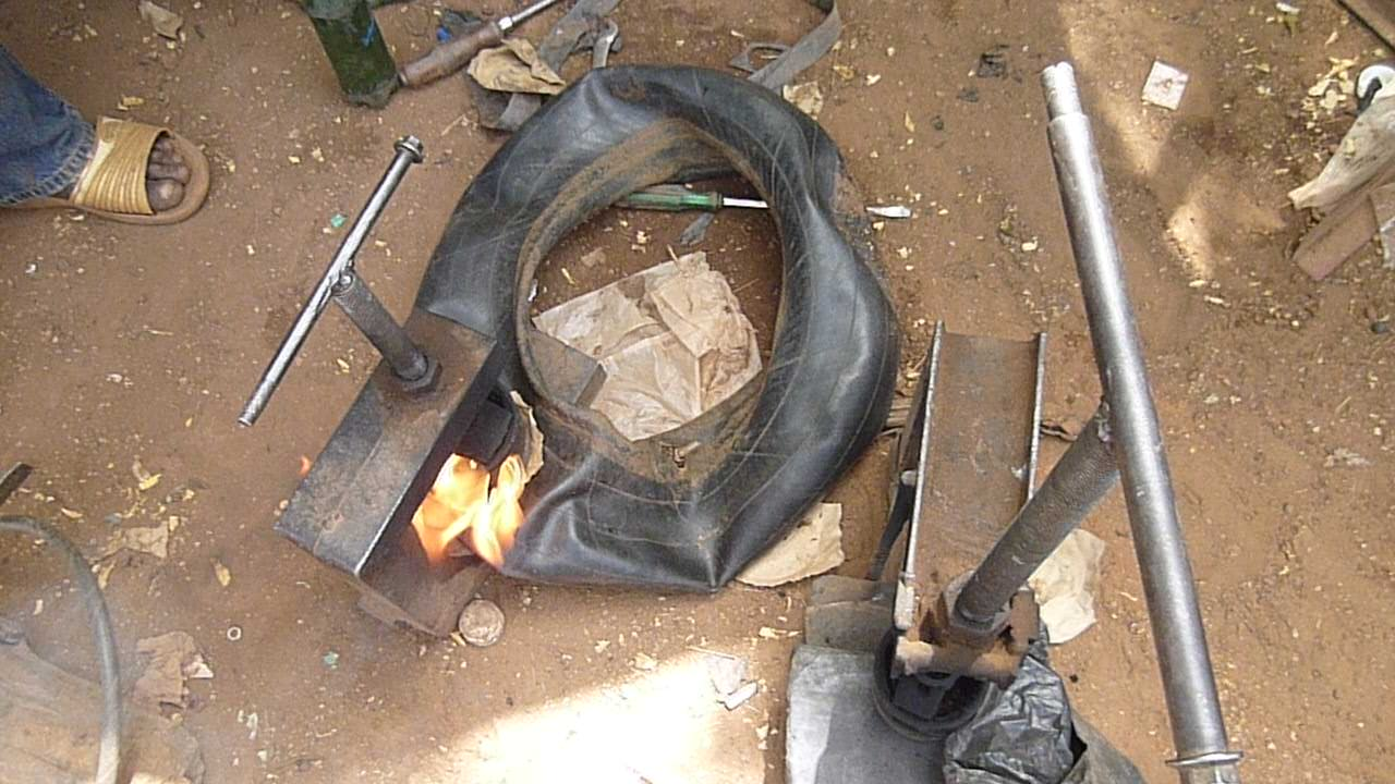 Burkina Faso - Guibaré - Collage de chambres à Air (COLAGE en Burkinabé, ou réparation de chambres à air en Français...) This is an image with the theme "Africa on the Move or Transport" from: Burkina Faso